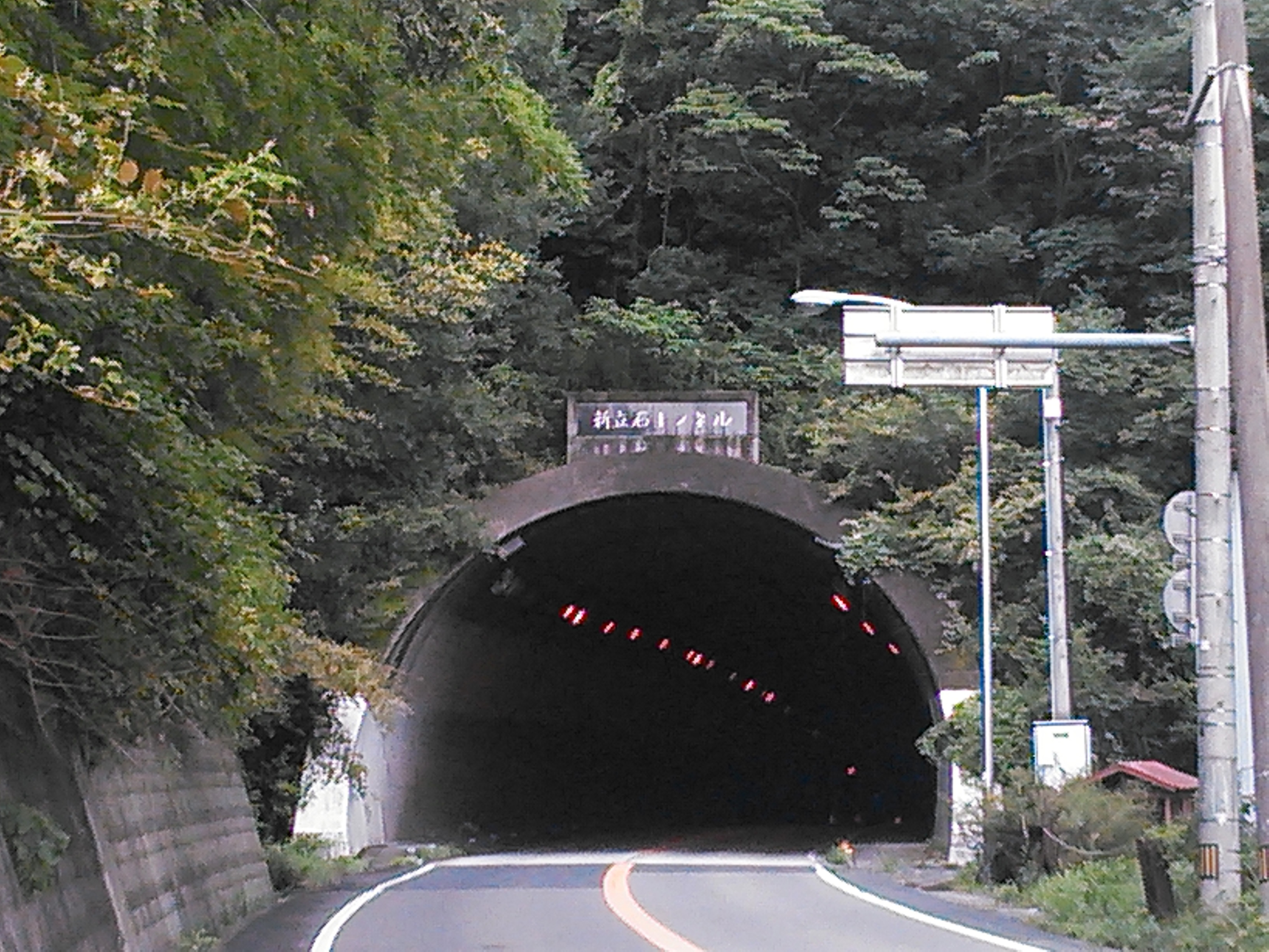 香川県木田郡三木町、新立石トンネル。投稿者本人により三木町側より撮影。